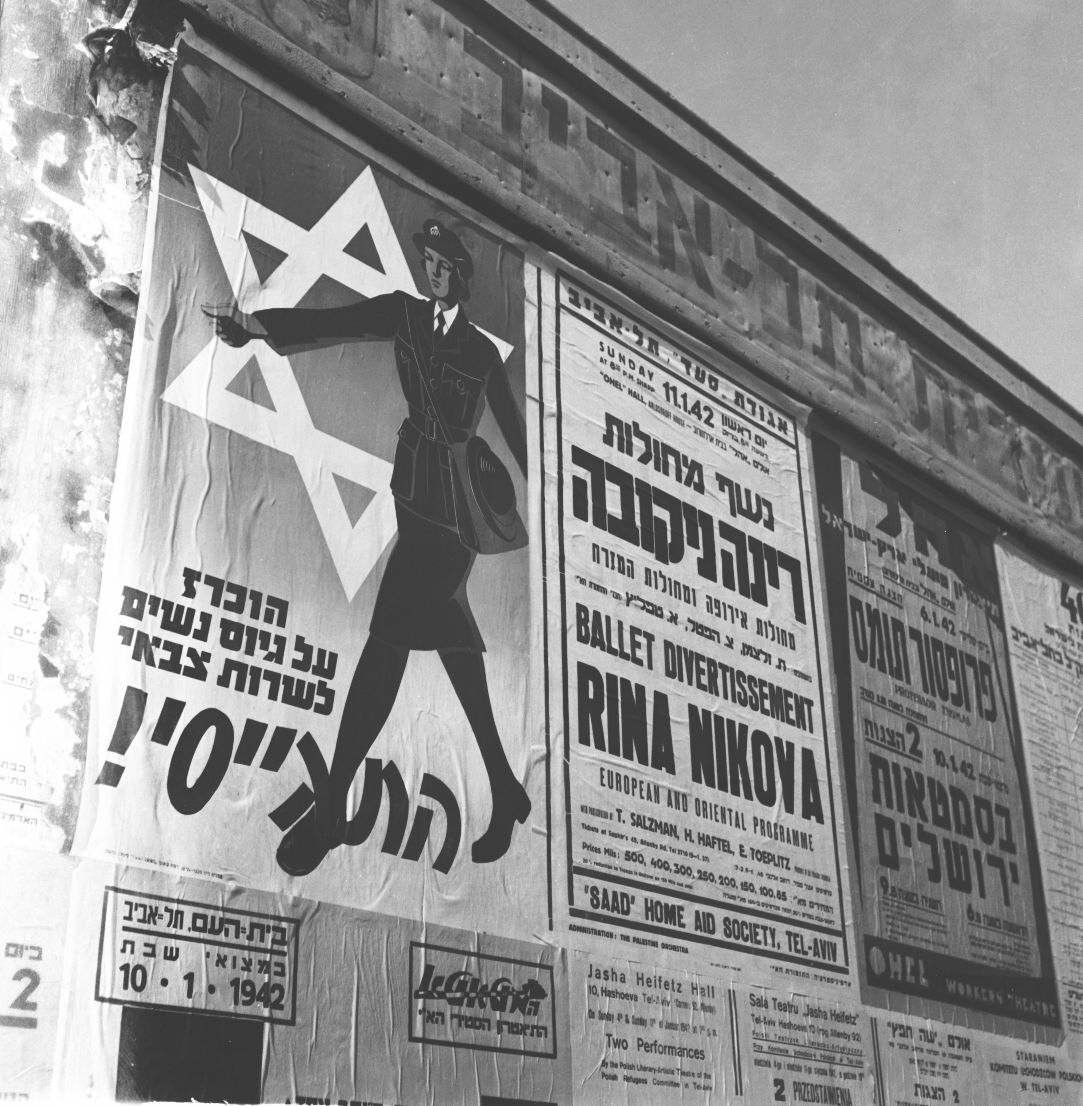 אוסף צילומים של הצלם זולטן קלוגר טווח מספרי התשלילים 16969 - 17290: PATS - חיל נשים, גיוס